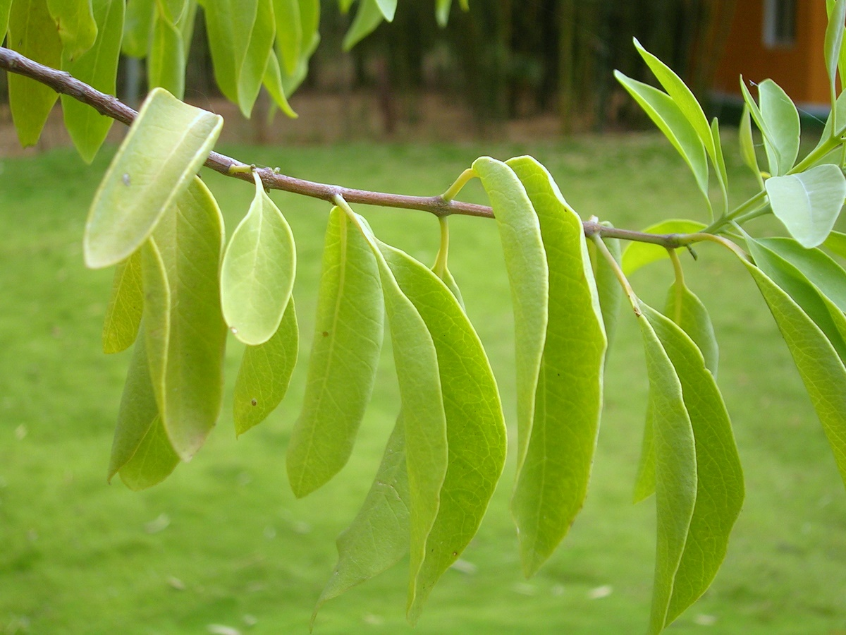 Santalum album twig from Karnataka India